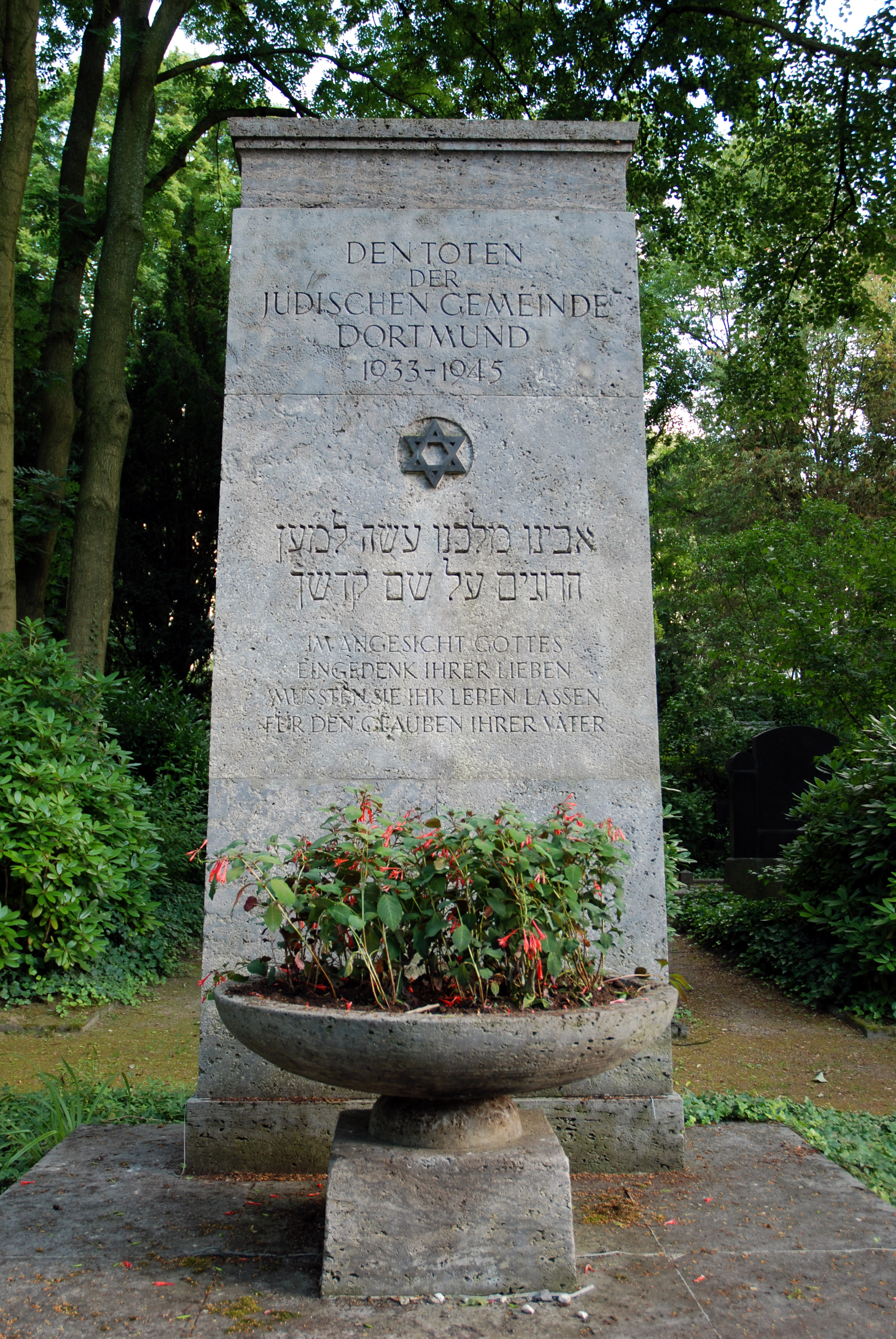 Dortmund, Innenstadt-Ost, Ostenfriedhof (Ostfriedhof), Mahnmal für die jüdischen Opfer des Faschismus in Dortmund mit Inschrift auf Deutsch und Hebräisch. Die Gedenkstätte ist eingefasst mit durch Ketten verbundenen Steinen, die die Namen von Konzentrationslagern tragen.